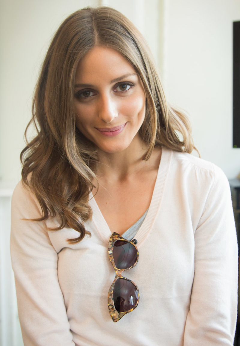 Olivia Palermo